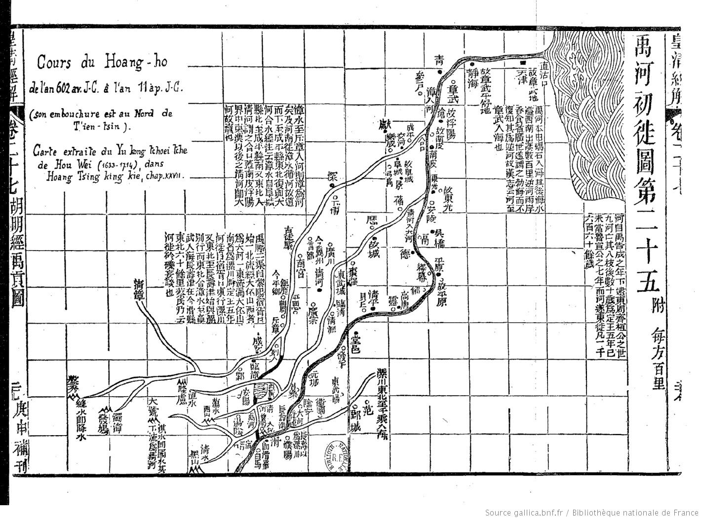 Carte du cours du Hoang-ho de l'an 602 av.J-C. à l'an 11 ap. J-C. Carte extraite du Yu kong tchoei tche de Hou Wei (1633 - 1714), dans Hoang Ts'ing king kie, chap. XXVII. Numérisation Gallica BNF du volume 3 des Mémoires Historiques de Sima Qian, traduction Edouard Chavannes 1895. Hors-texte après la page 672.